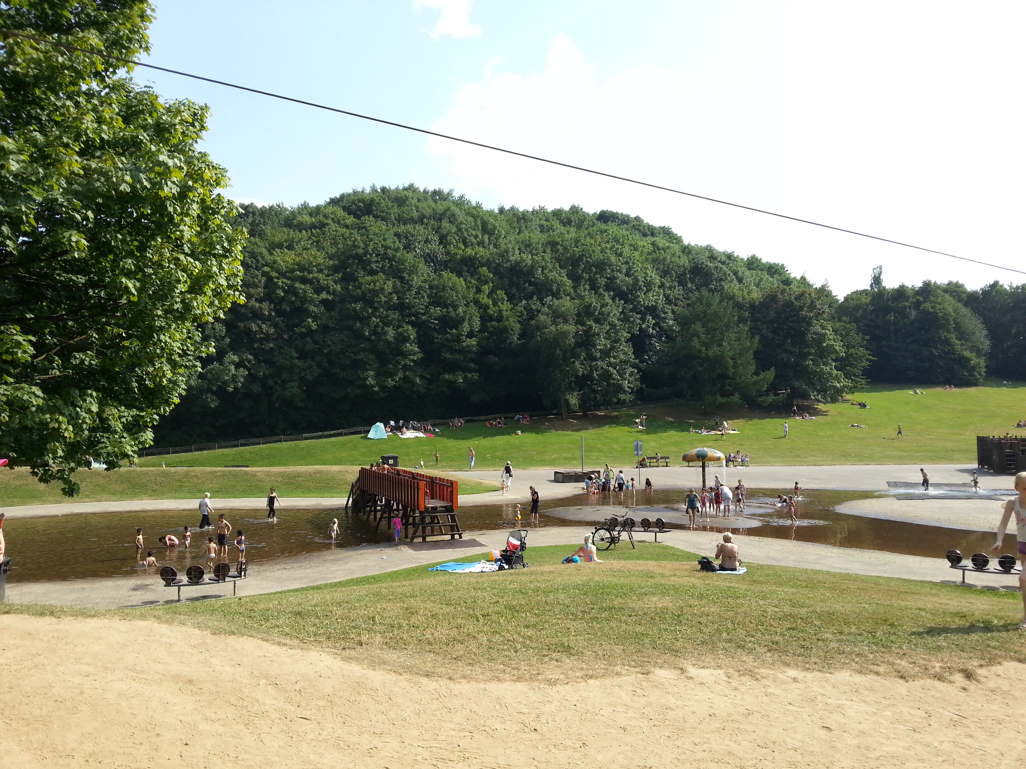 Rheydter Höhe auch Müllberg genannt